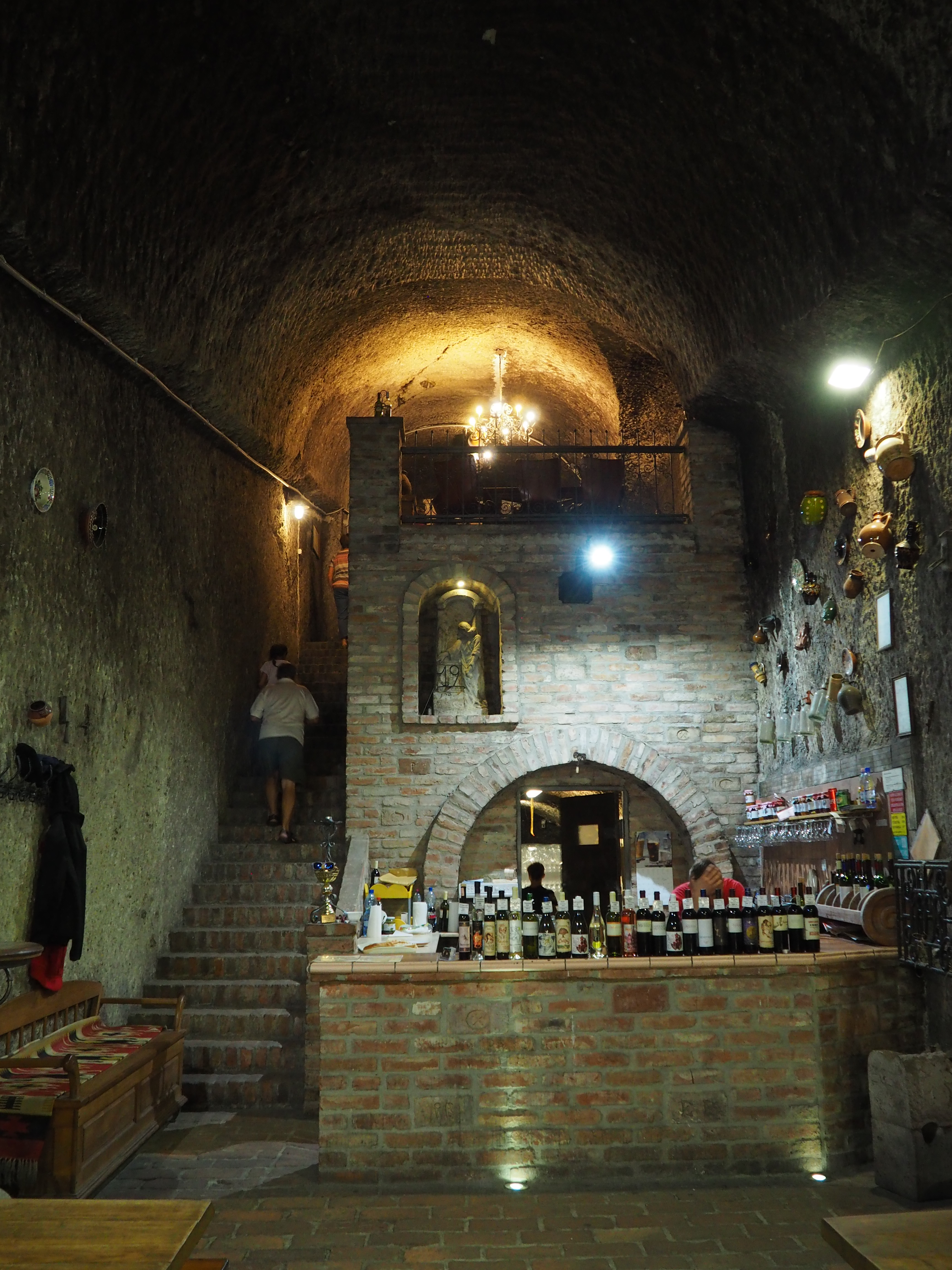 Hagymási pincészet - 45-ös pince, Eger